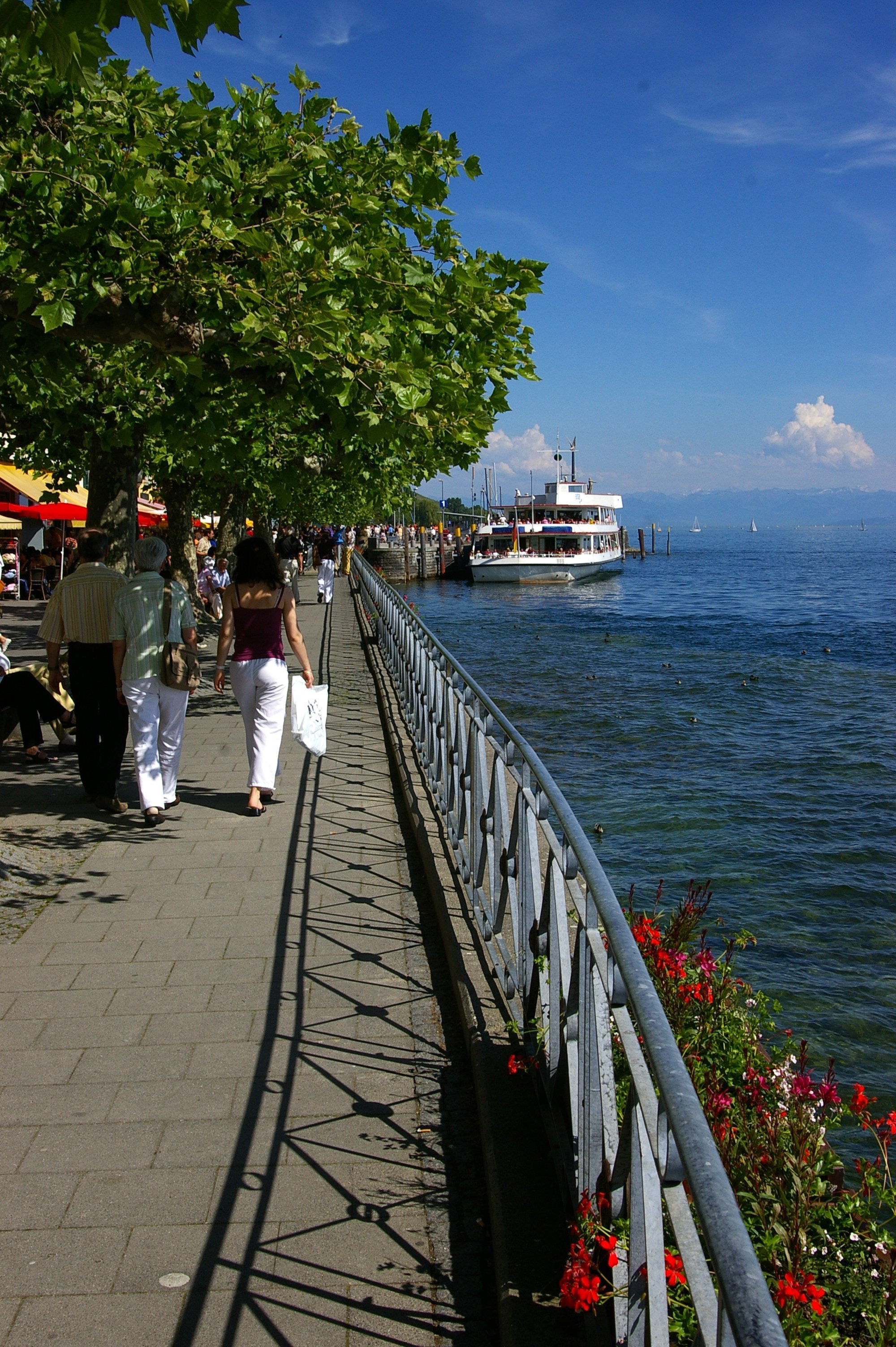 Meersburg - Uferpromenade